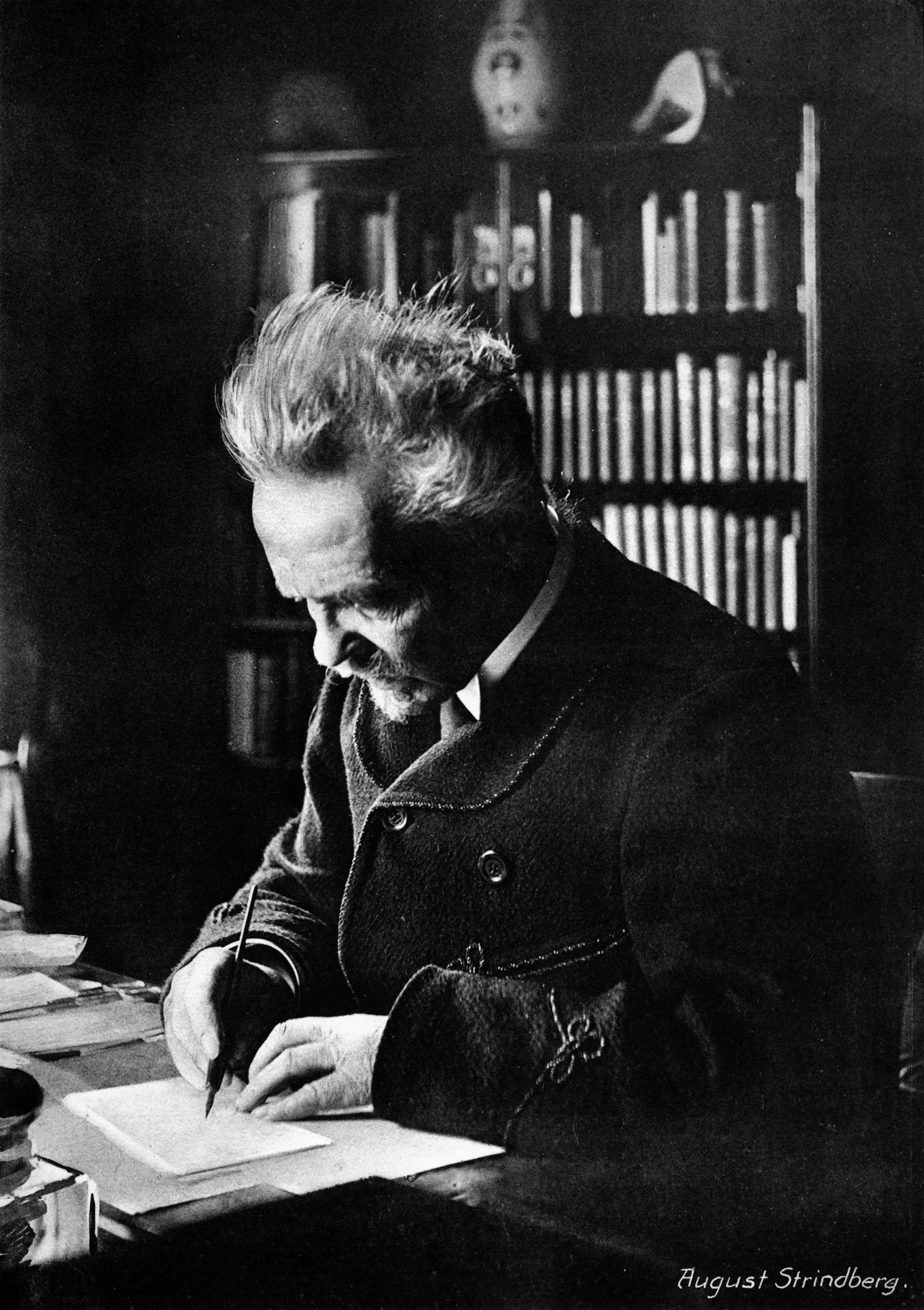 Strindberg fotograferad för häftet "Hos svenska författare och konstnärer", cirka 1912